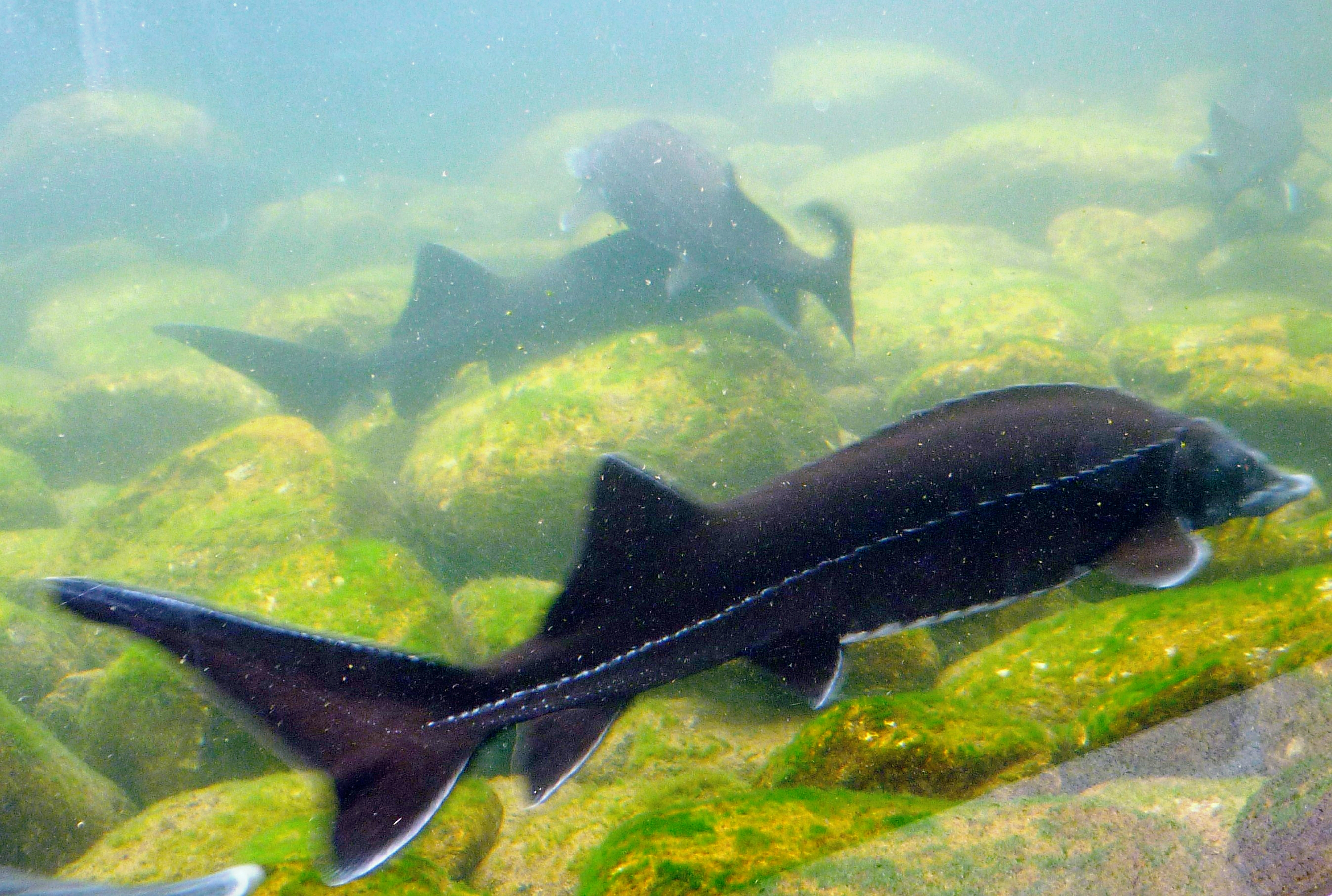 Stör im Tropenhaus Frutigen